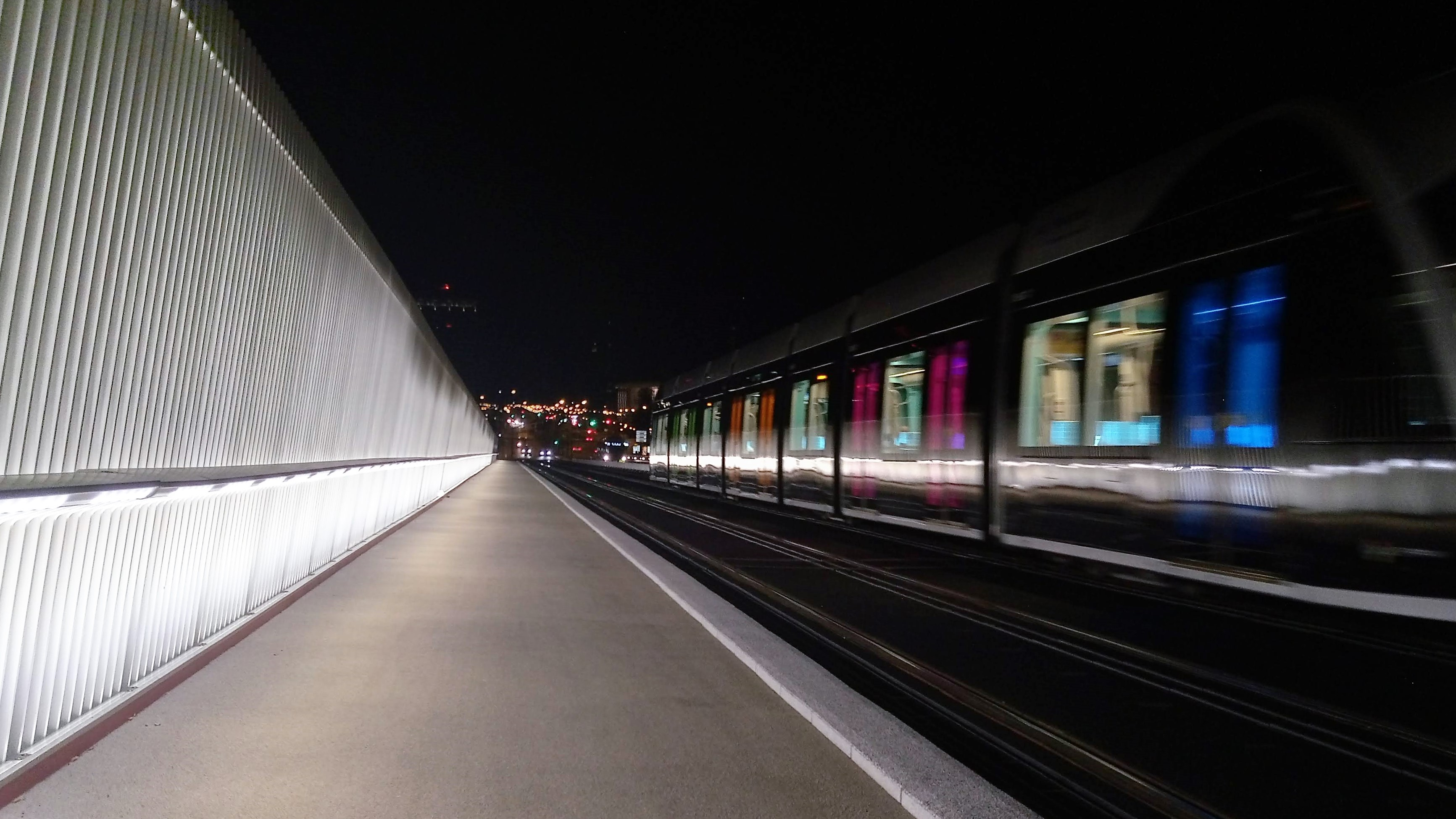 Le Pont Grande-Duchese Charlotte. Le nouveau garde-corps (2017) avec éclairages fonctionnel et d'ambiance intégrés.